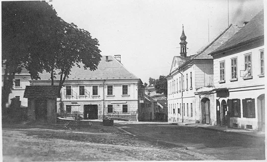 Dolní Dvořiště, pohled na náměstí severním směrem, po pravé straně radnice, uprostřed hostinec.